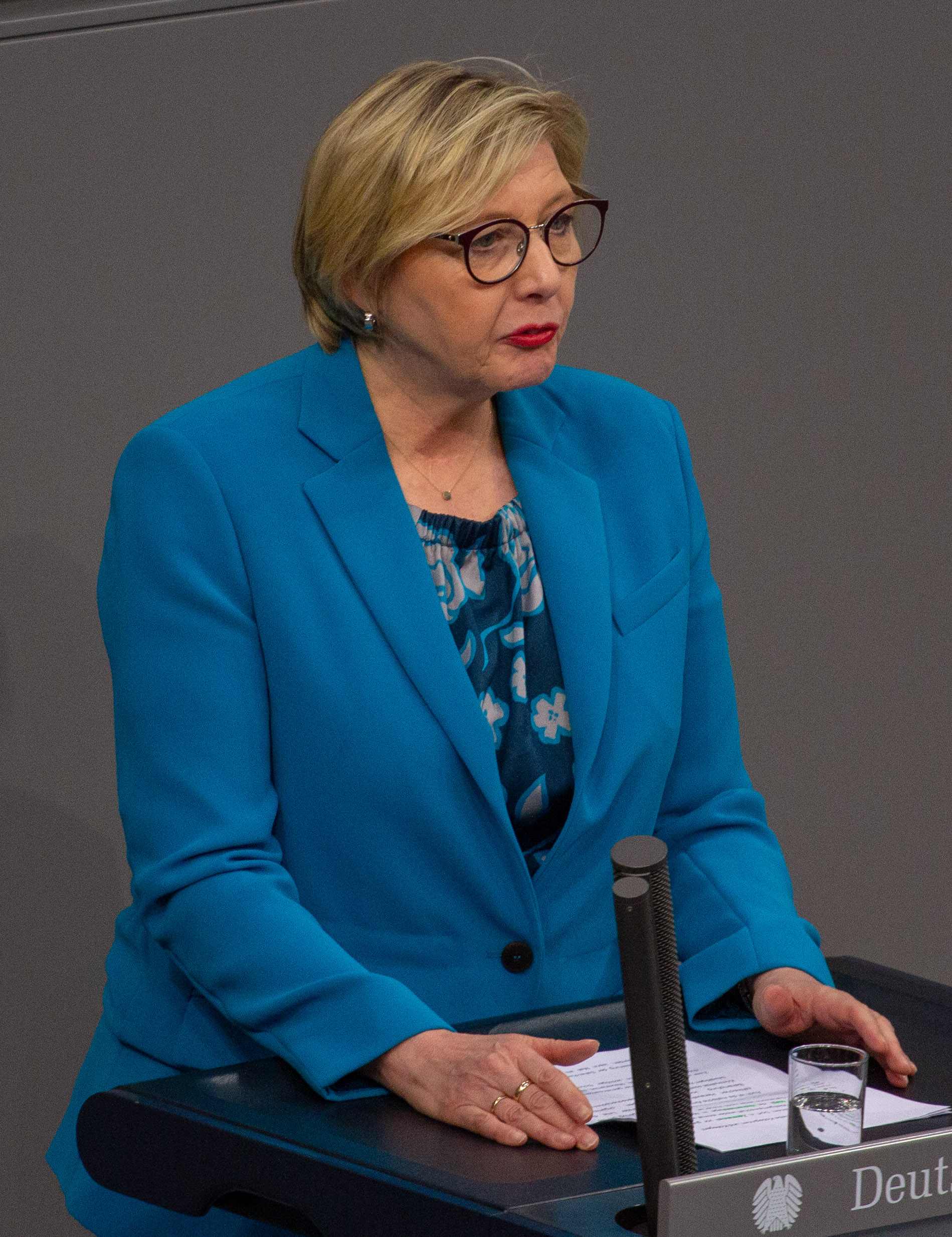 Gisela Manderla, Mitglied des Deutschen Bundestages, während einer Plenarsitzung am 11. April 2019 in Berlin.